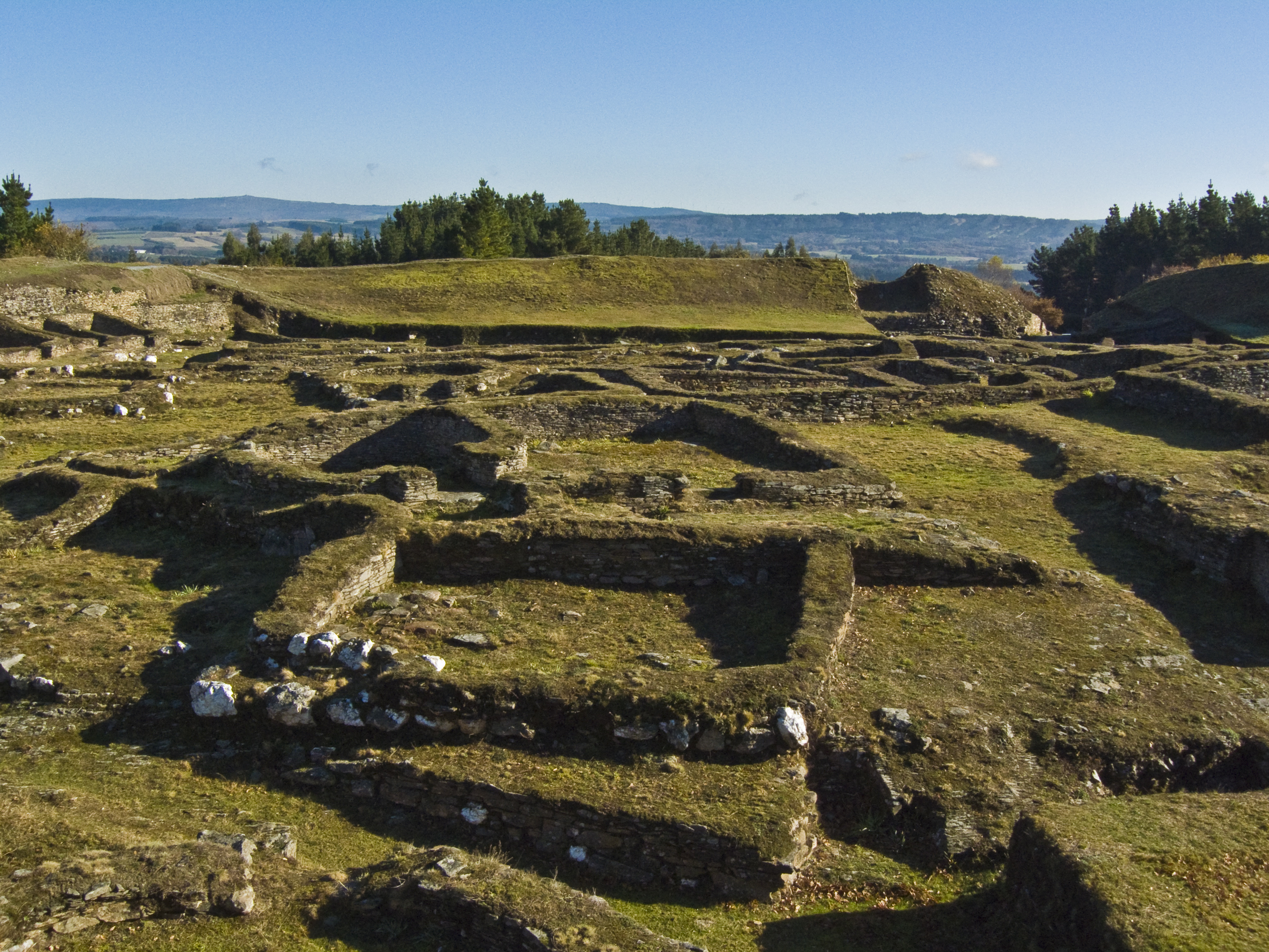 Vista xeral da croa no Castro de Viladonga